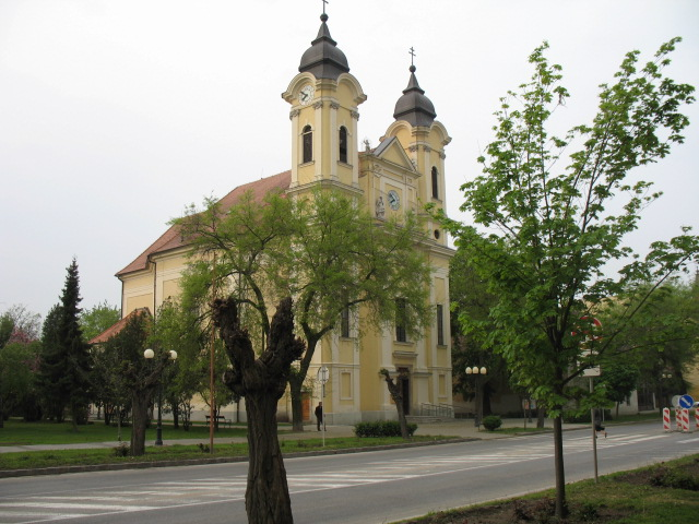 Galánta